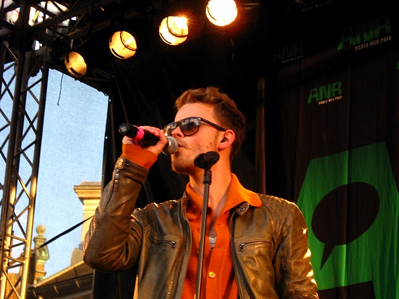 Rasmus Thude i Hjørring